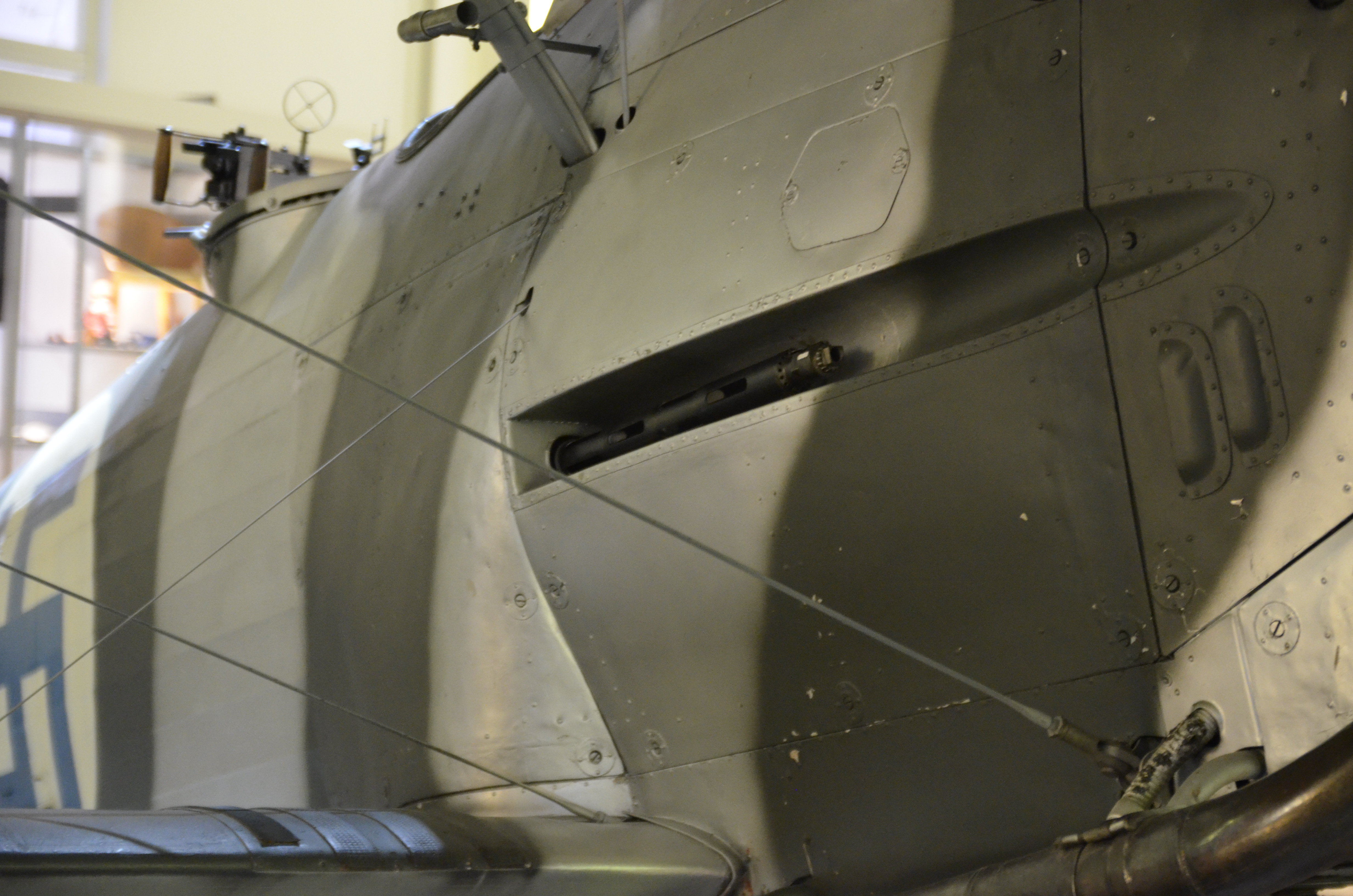 Kulspruta m/22 Fv monterad i flygplan B4 på flygvapenmuseum.